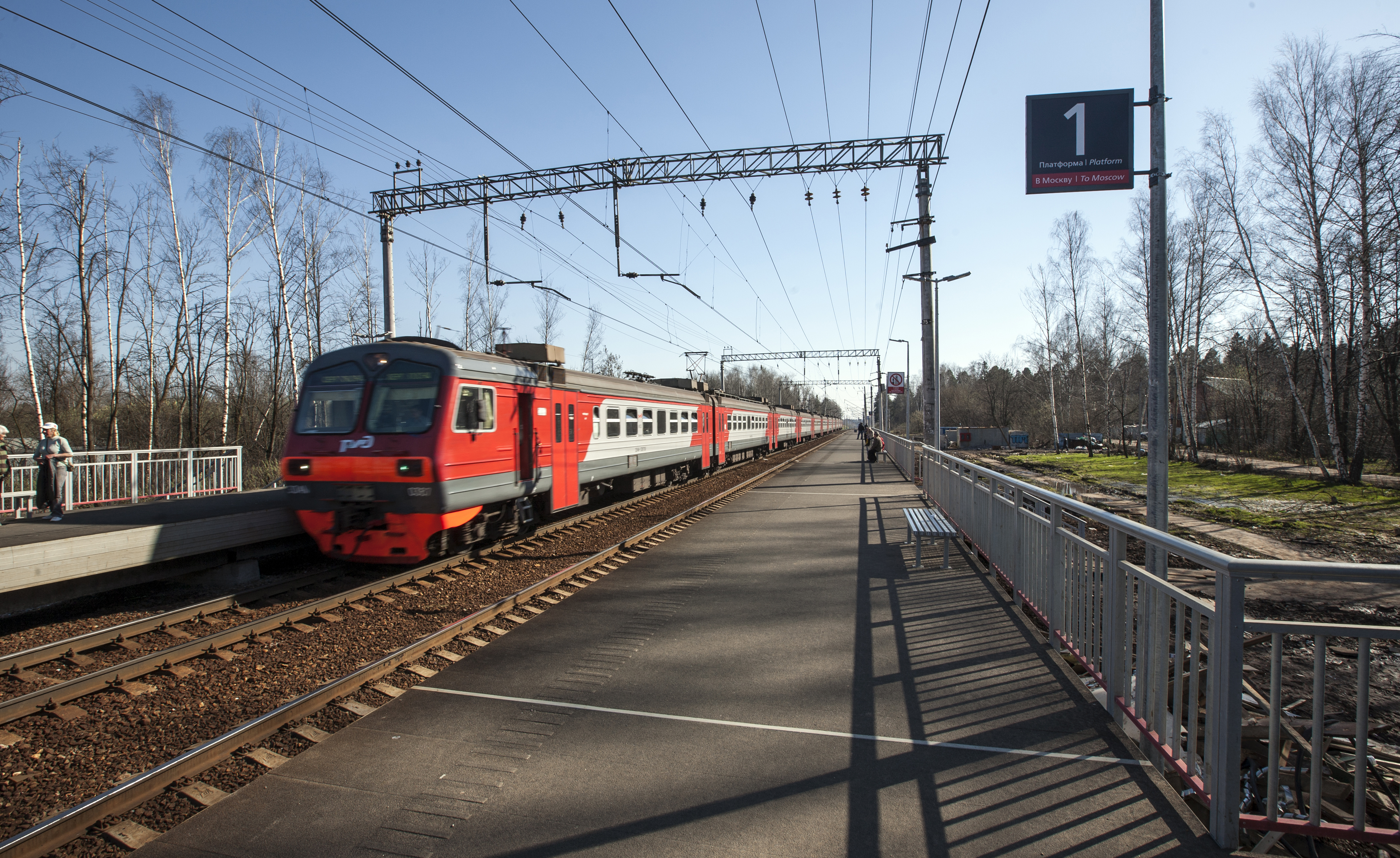 Станция «Заветы Ильича» Московской железной дороги. Ярославское направление